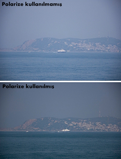 Polarize filtrenin kullanılmış ve kullanılmamış halini gösteren bir fotoğraf.